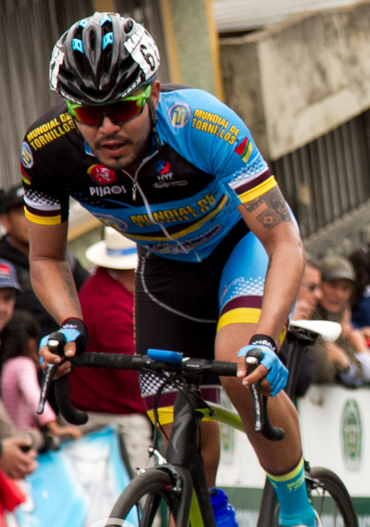 Elites Hombres Campeonatos Nacionales de Ruta Boyará 2016.